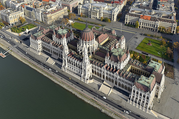 Az Országház a Duna felől, fentről fényképezve